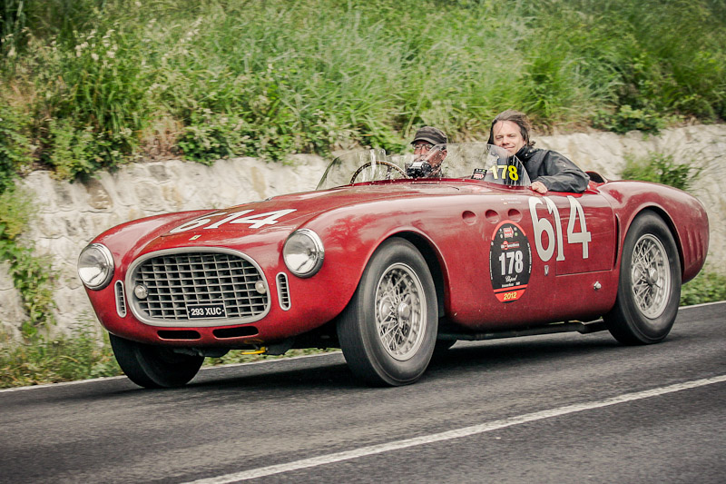 MILLE MIGLIA 2012 - SS della Futa a Pianoro (BO). Ferrari 340 America Spider by Vignale. Chassis #0196A.[1]